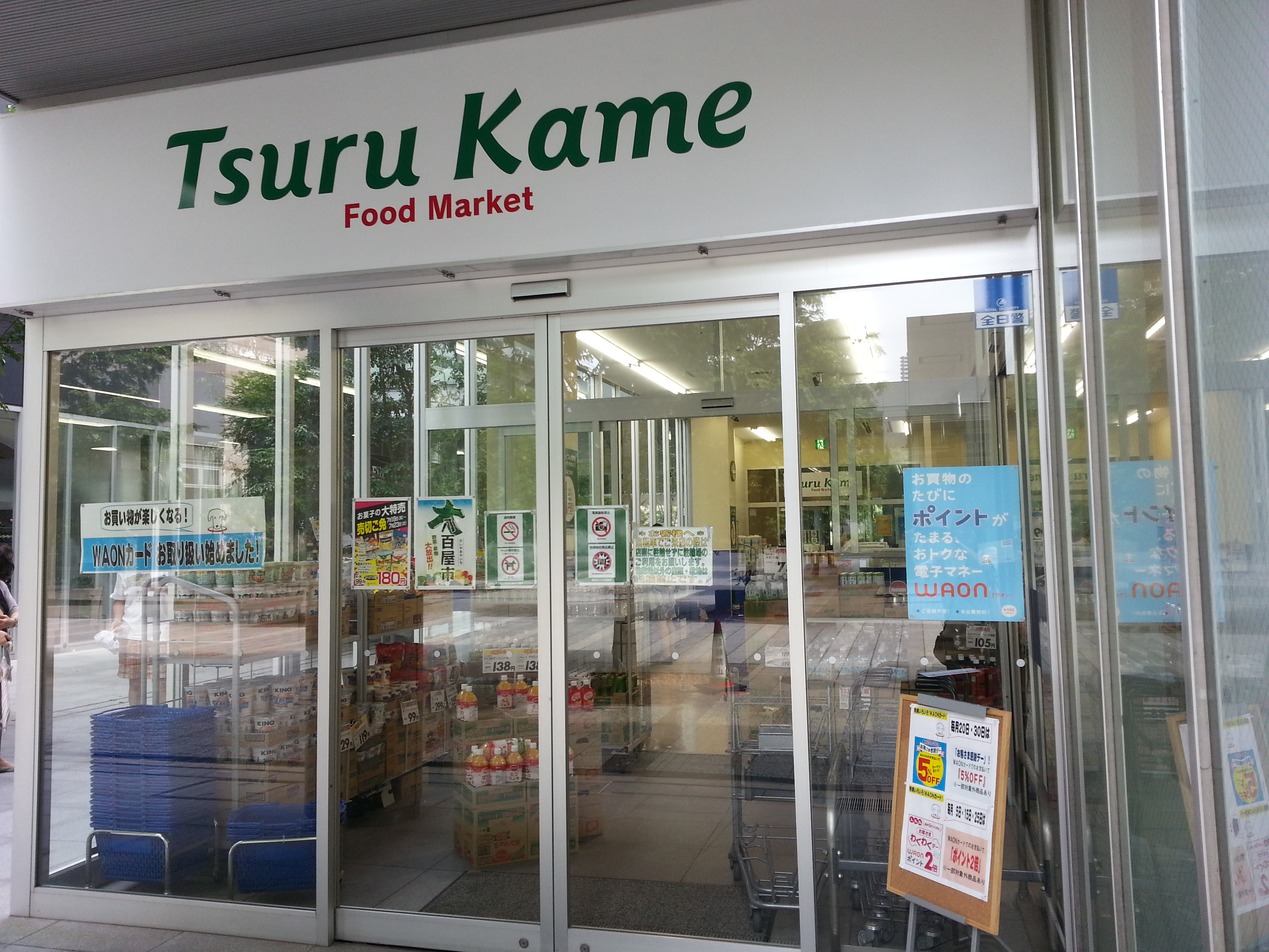 TSURUKAMEみなとみらい店。看板の表記は「Tsuru Kame」。旧テスコエクスプレス（TESCO EXPRESS）みなとみらい店。